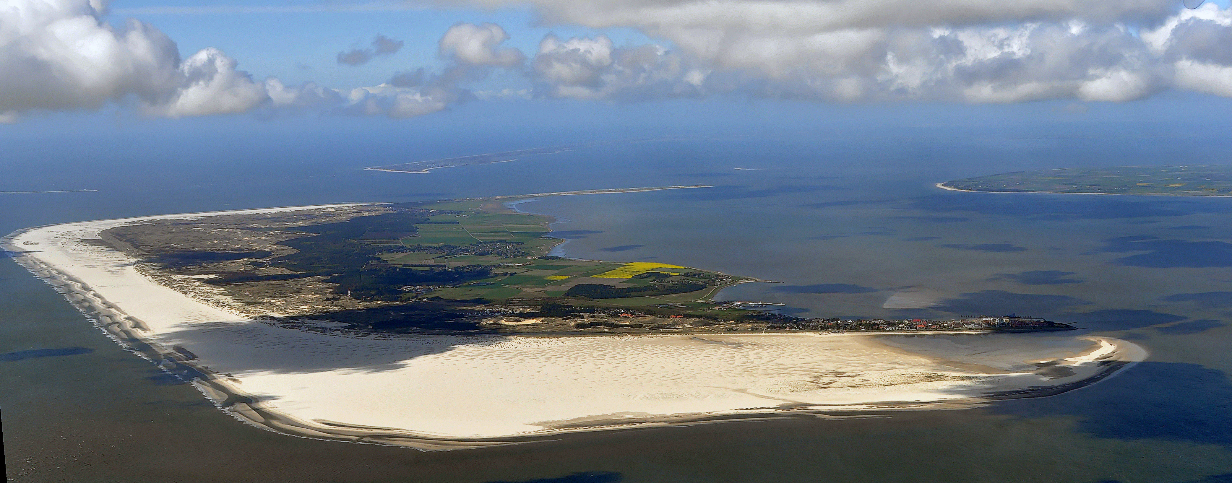 Luftbilder von der Nordseeküste 2012-05: Amrum